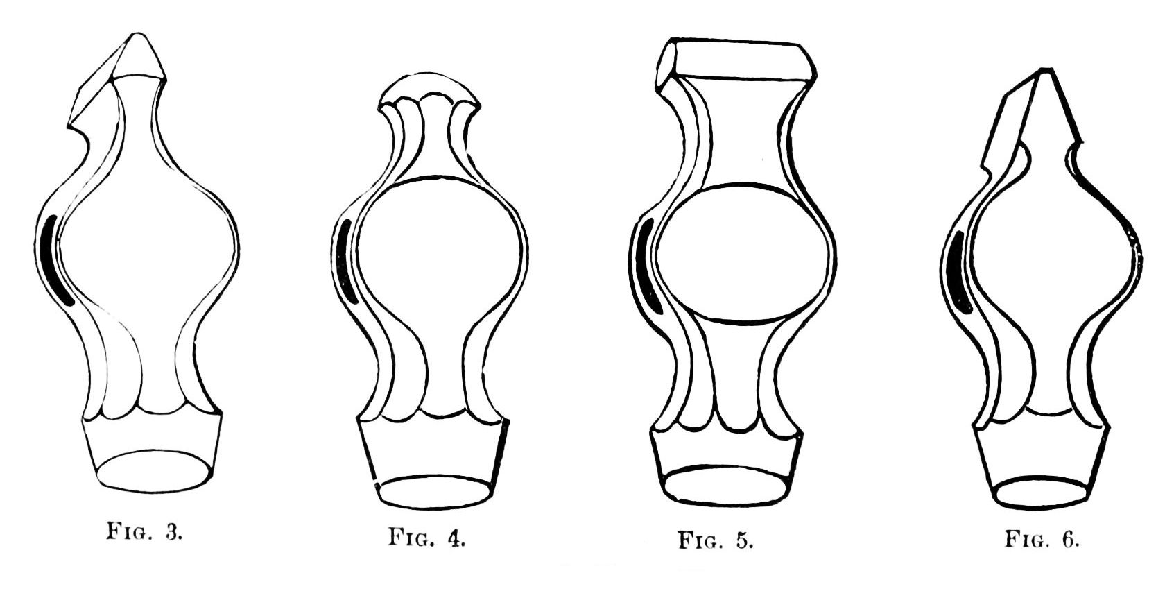 Engineer hammers